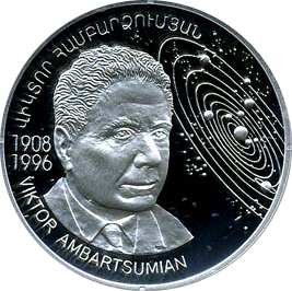 Памятная монета Армении 2008 года "Виктор Амбарцумян" - 1000 драм - серебро 925